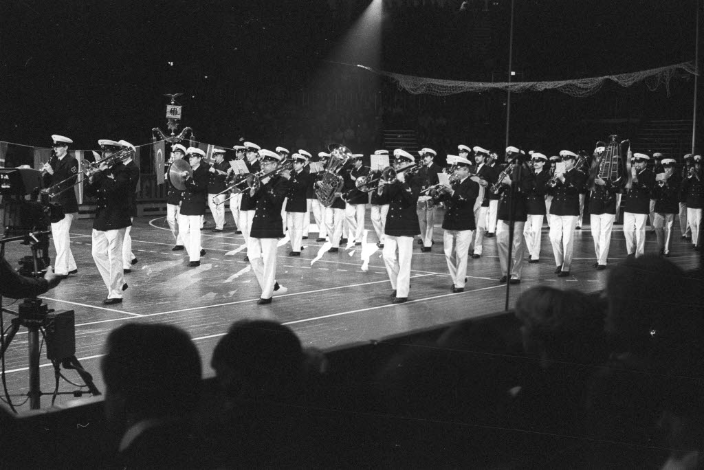 Marinemusikkorps Ostsee.